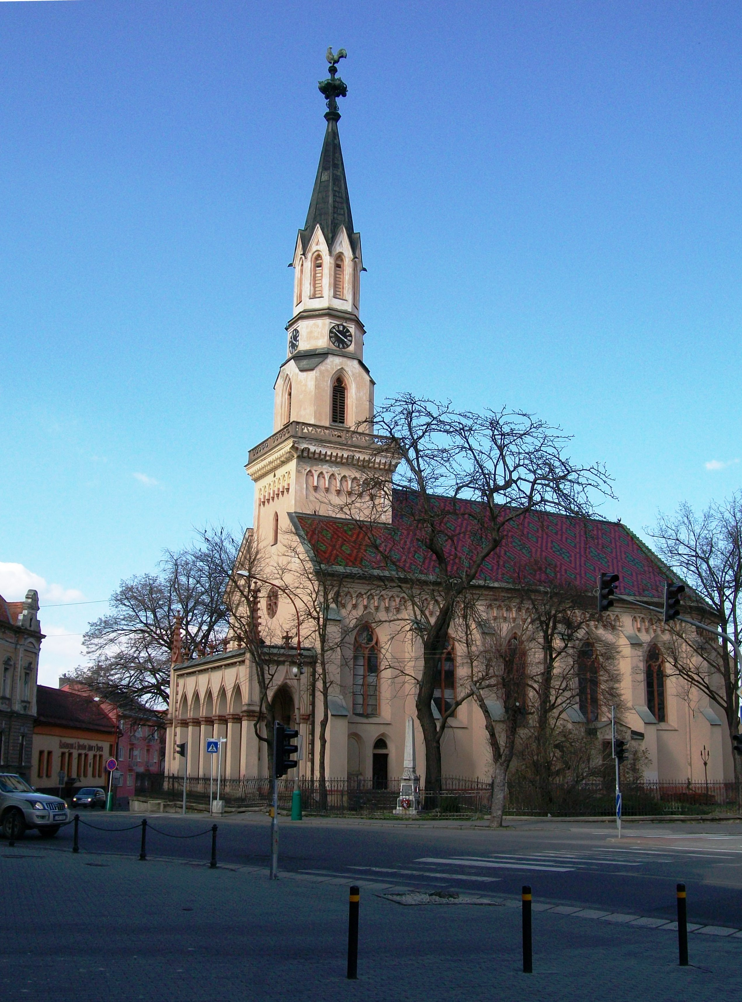 Kalvínsky kostol - Neogotický kalvínsky (reformovaný) kostol v historickom jadre Lučenca. Bol postavený v rokoch 1851-1853